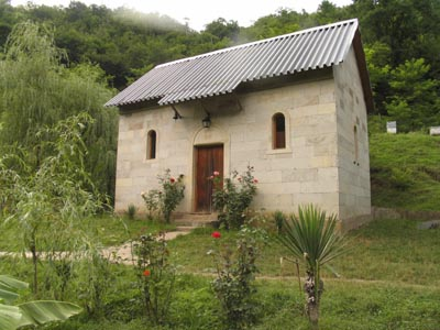 12 მოციქულის ტაძარი